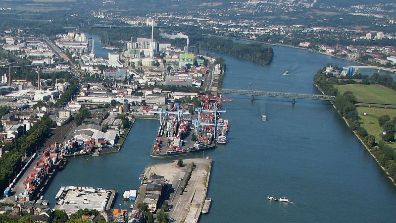 Rhein zwei Häfen in Mainz am Rhein Zollhafen und Industriehafen Foto 2008 Wolfgang Pehlemann Wiesbaden IMG_0263